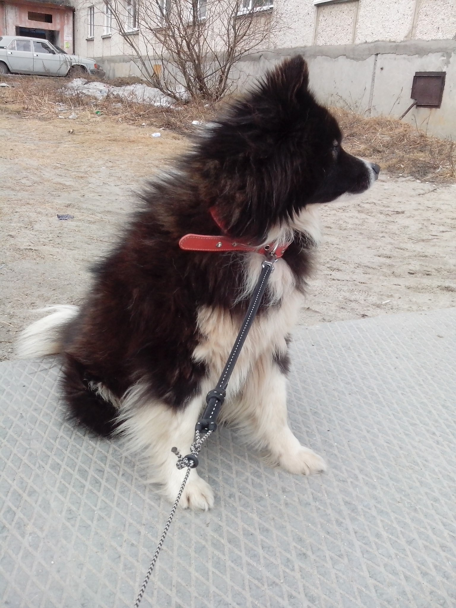 ненецкая оленегонная лайка, оленегонка, ненецкая лайка